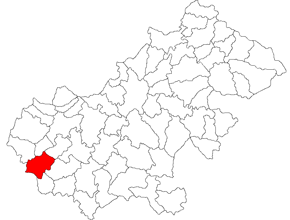 Categorie:Hărţi ale judeţului Satu Mare